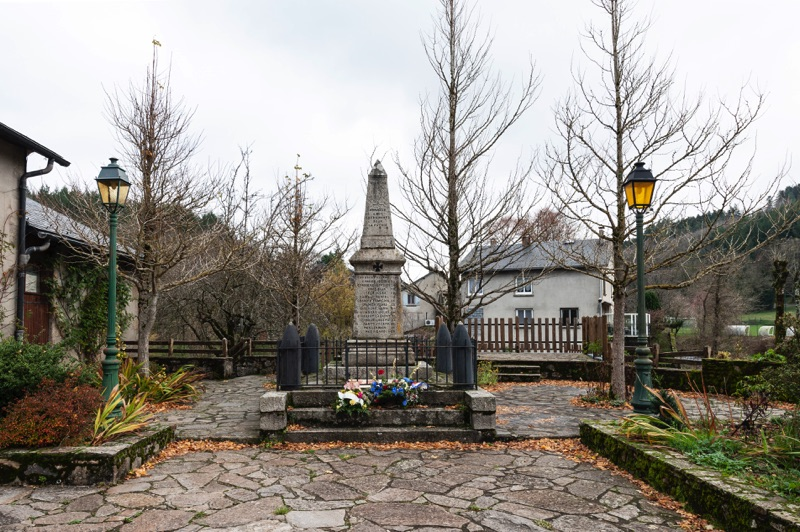 Monument aux morts - Archives départementales de l’Hérault - FRAD034-2458W-Fraisse-Sur-Agout-00001